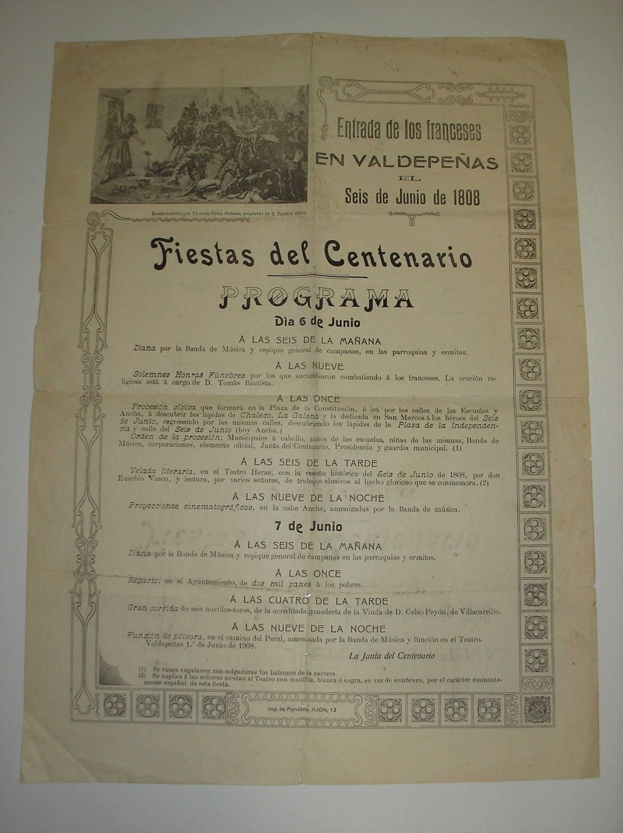 FOTO PROPIA. CARTEL PROPIEDAD DE USUARIO Valdoria.